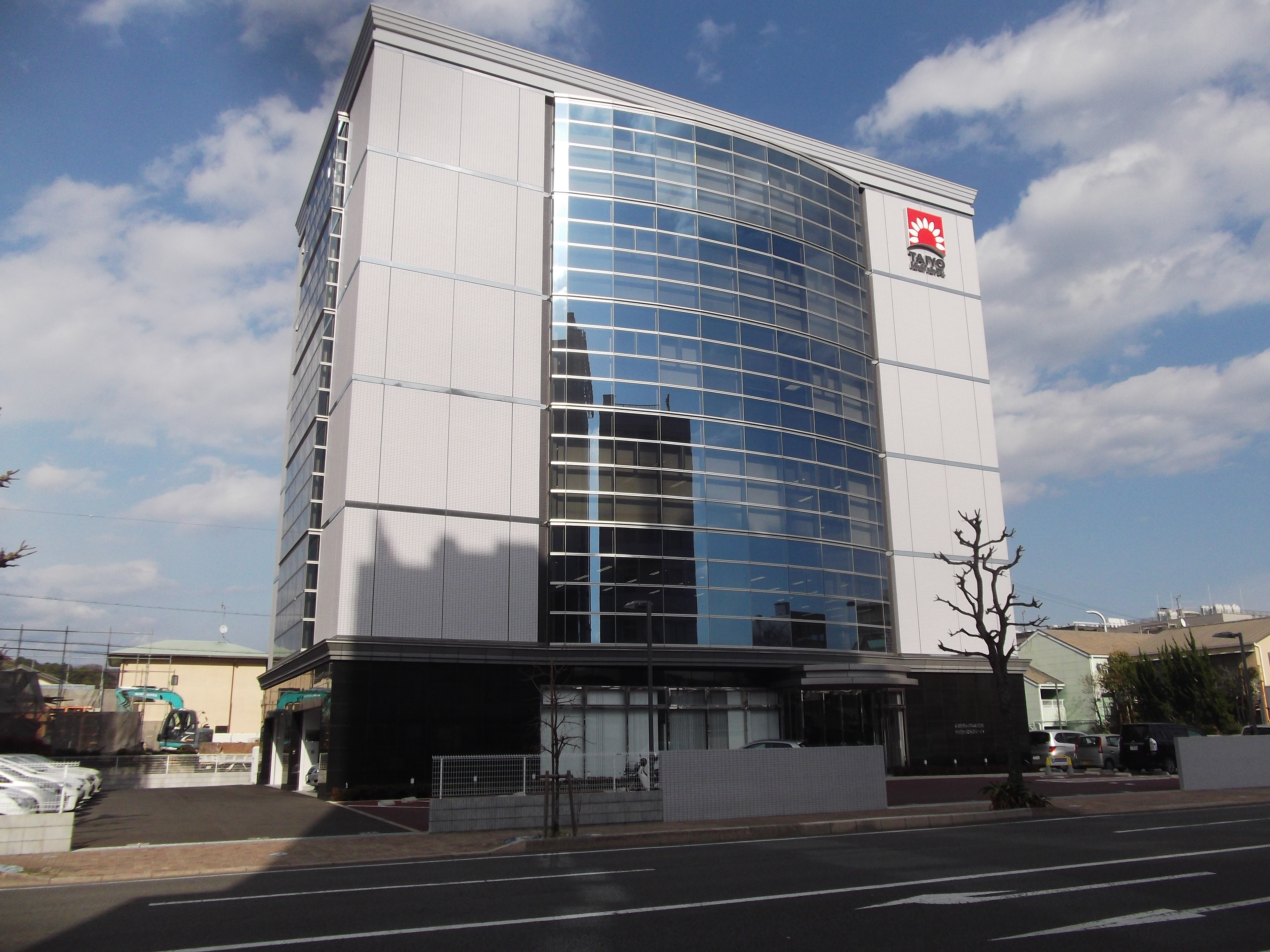 太陽建機レンタル本社ビル